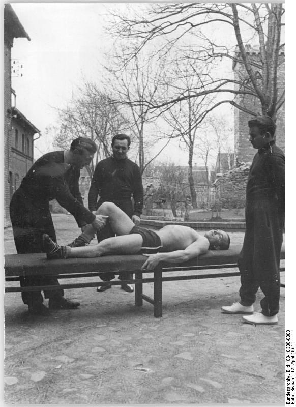 Calbe, DS-Sportschule, Lehrgang für Sportler Illus Biscan Hein-Nb. 12.4.1951 Die Schwerathletik-Schule "Werner Seelenbinder" in Calbe-Saale. Die DS-Sportschule für Schwerathleten "Werner-Seelenbinder" hilft den Schwerathleten in der DDR neue Bestleistungen zu erzielen und einen starken Nachwuchs heranzubilden. Bisher stellten die Gewichtheber-Elite 47 und die Rasen-Krafsportler 9 neue Rekorde auf. UBz: Sportlehrer Werner Assmann macht alle Lehrgangsteilnehmer mit den wichtigsten Regeln der Ermüdungs- und der Vorbereitungsmassage bekannt. Illus Berlin W8